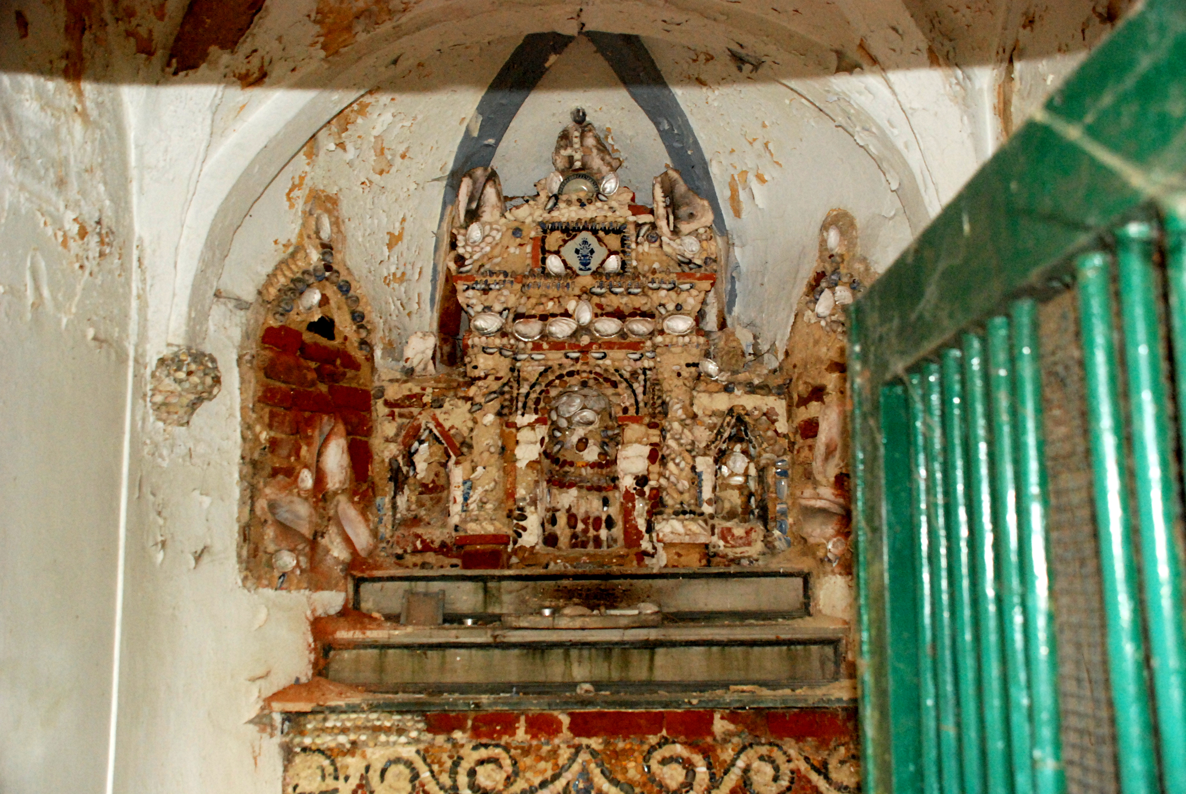 Belgique - Brabant wallon - Limal - Chapelle de Grimohaye